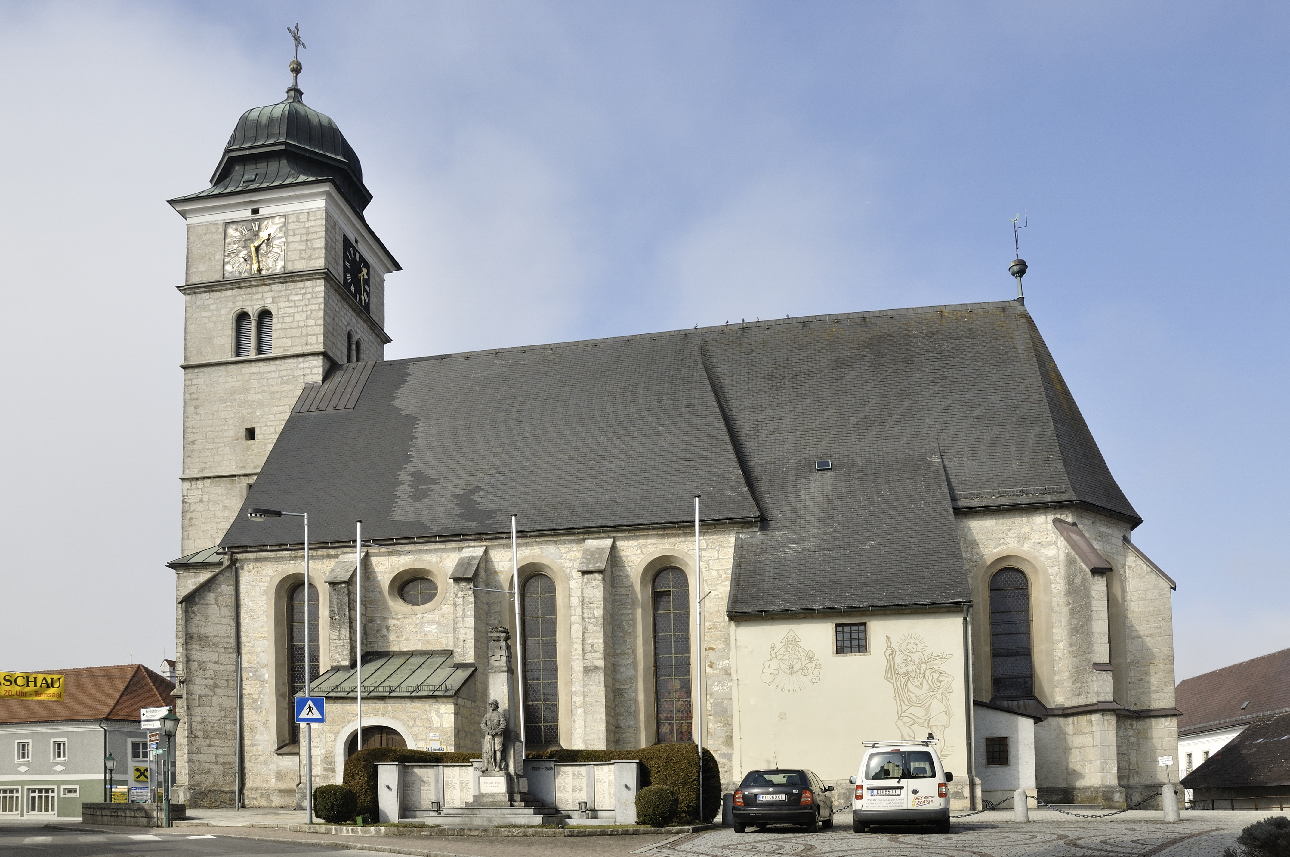 Kath. Pfarrkirche hl. Benedikt